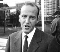 imprenditore italiano